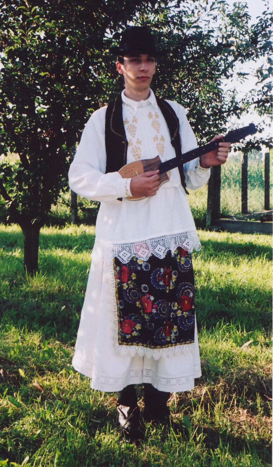 Srpskohrvatski / српскохрватски: Baranjska bošnjačka muška nošnja s tamburicom